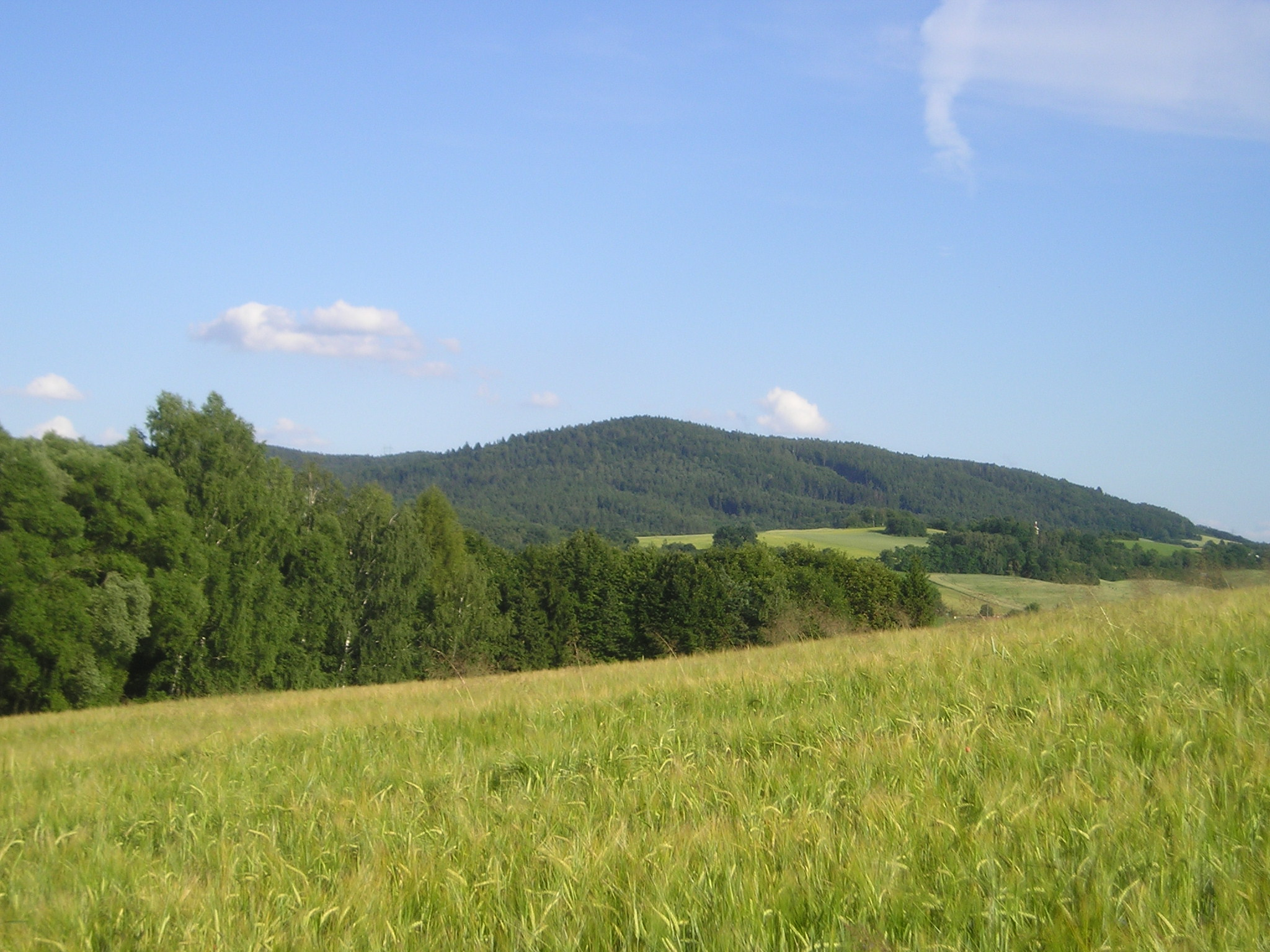 Letní pohled na Čerčanský chlum od Vysoké Lhoty.